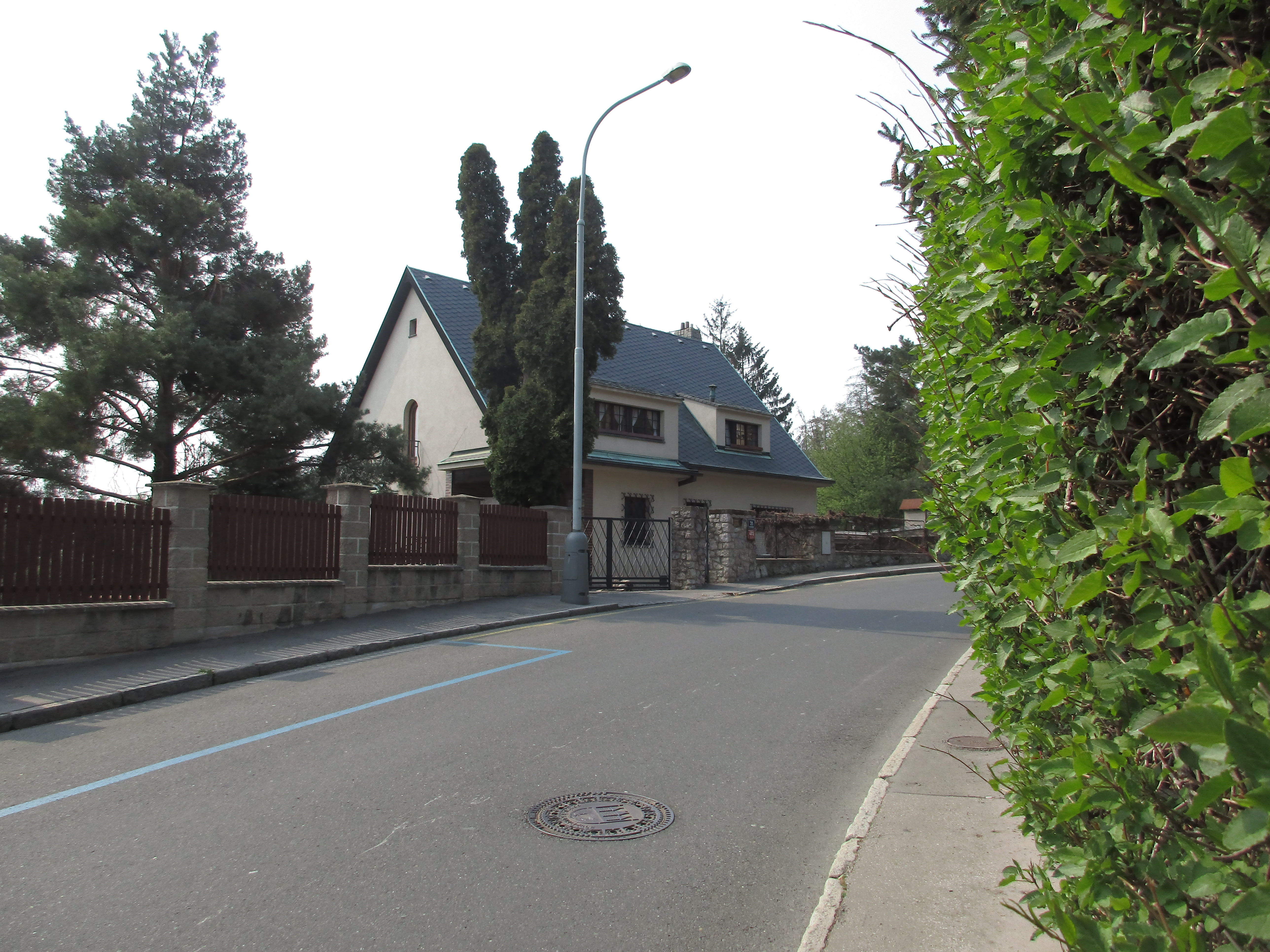 Barrandovská 403/31, Praha 5-Hlubočepy